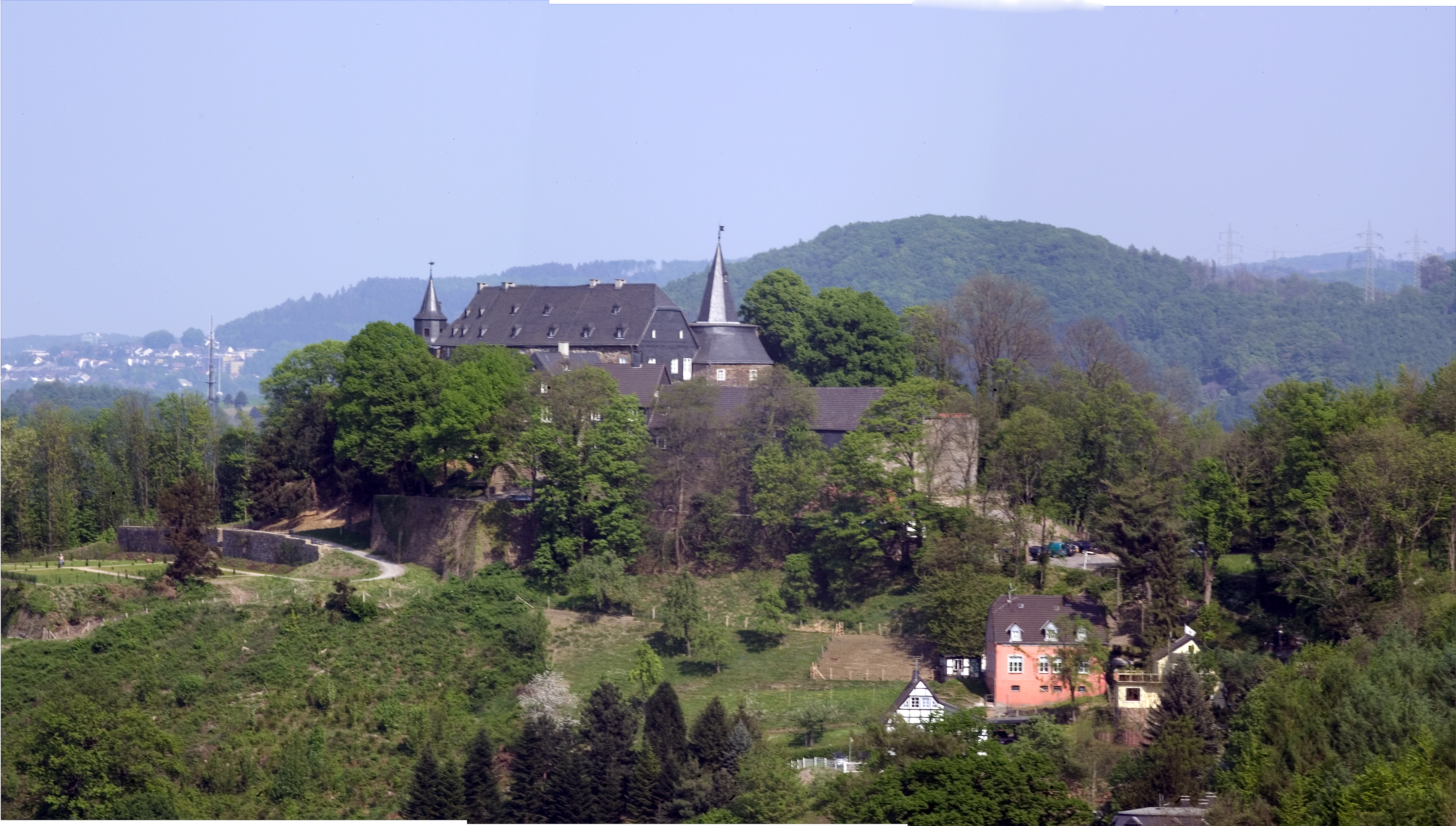 Die Geschichte der Hohenlimburg beginnt mit dem Anschlag auf den Kölner Erzbischof Engelbert von Berg durch Graf Friedrich von Isenberg. Um 1240 erbaute dessen Sohn Dietrich die Burg für seinen Streit um das verlorene Erbe des geächteten Vaters. Graf Dietrich von Isenberg-Limburg erbaute um 1240 die Hohenlimburg 1511 wurde die Burg an die Grafen von Neuenahr vererbt, welche die Anlage durch Bauten am Pallas erweiterten. 1584 musste Graf Adolf die Belagerung und Besetzung der Hohenlimburg durch Kurkölnische Truppen hinnehmen, die bis über seinen Tot hinaus andauerte.1592 ging die nach wie vor besetzte Burg an das Haus Bentheim. Erst 1610 konnte Graf Gumprecht die Hohenlimburg beziehen, die er zur gräflichen Residenz ausbauen ließ. Im Dreißigjährigen Krieg wurde die Burg 1633 durch Lothar Dietrich von Bönninghausen belagert und erneut besetzt. Ein Brand zerstörte die Vorburg bis auf die Grundmauern. Im 18. Jahrhundert wurde die Hohenlimburg nach Beilegung von Erbstreitigkeiten mit dem Haus Preußen zum Residenzschloss ausgebaut, welches nach wie vor von der fürstlichen Familie genutzt wird. Das Schlossmuseum entstand in den zwanziger Jahren des letzten Jahrhunderts. Der Höhengarten, der Wehrgang und das Kaltwalzmuseum wurden 2008 restauriert.